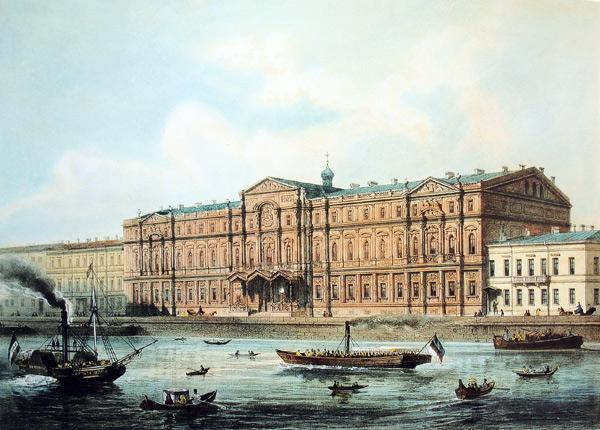 Ново-Михайловский дворец. Дворцовая набережная. Река Нева.